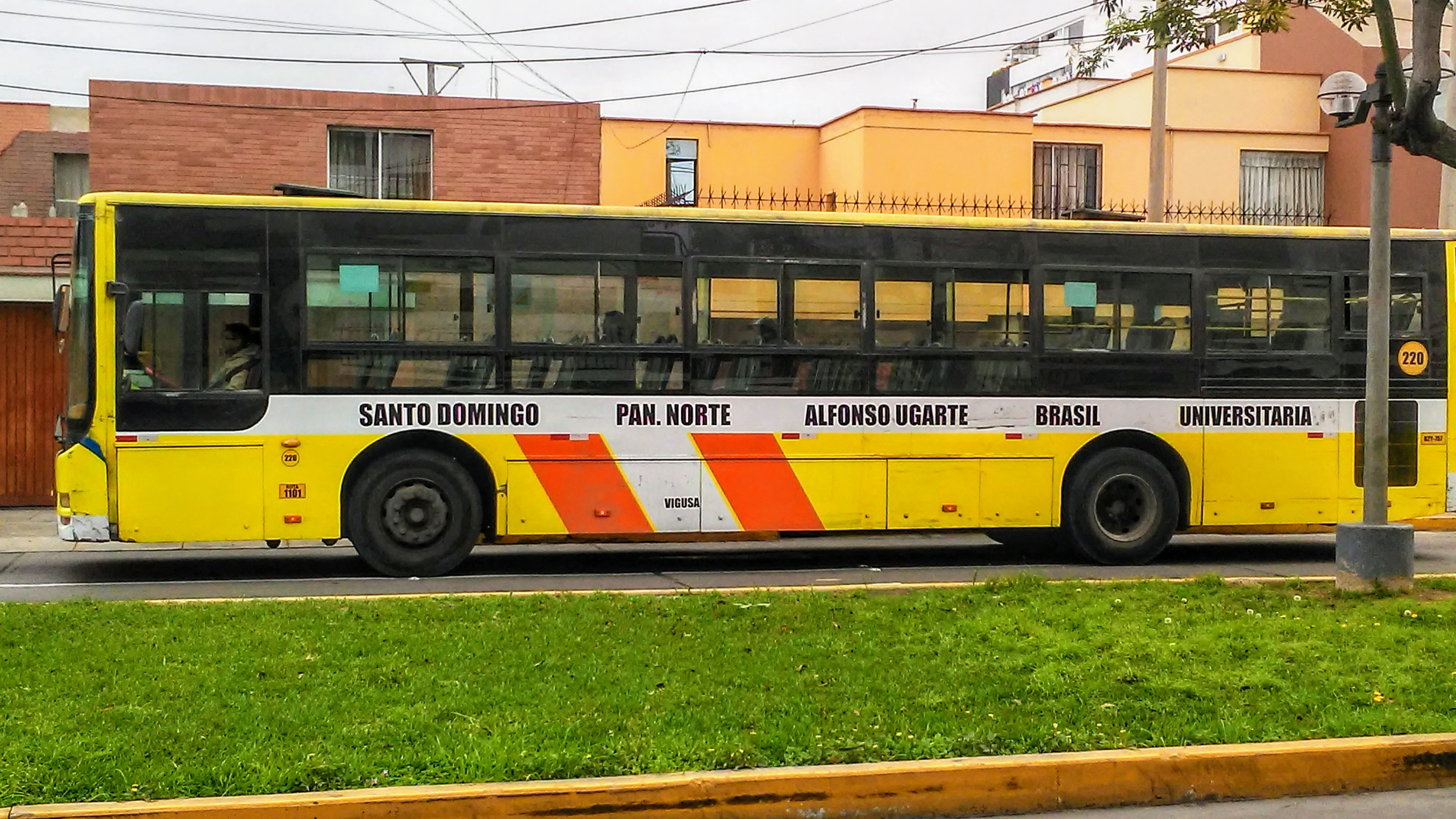 Bus urbano en Lima